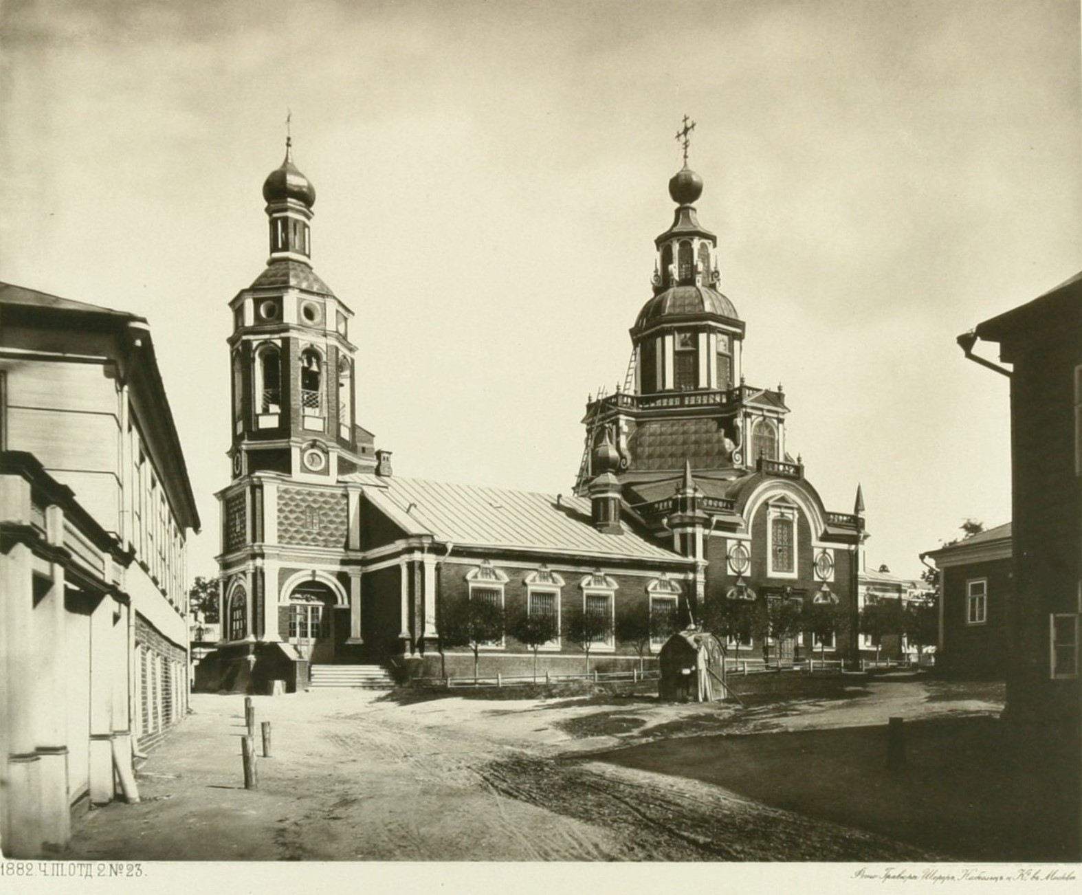 Храм Иоанна Воина на Якиманке (г.Москва, ул. Большая Якиманка, 46.)